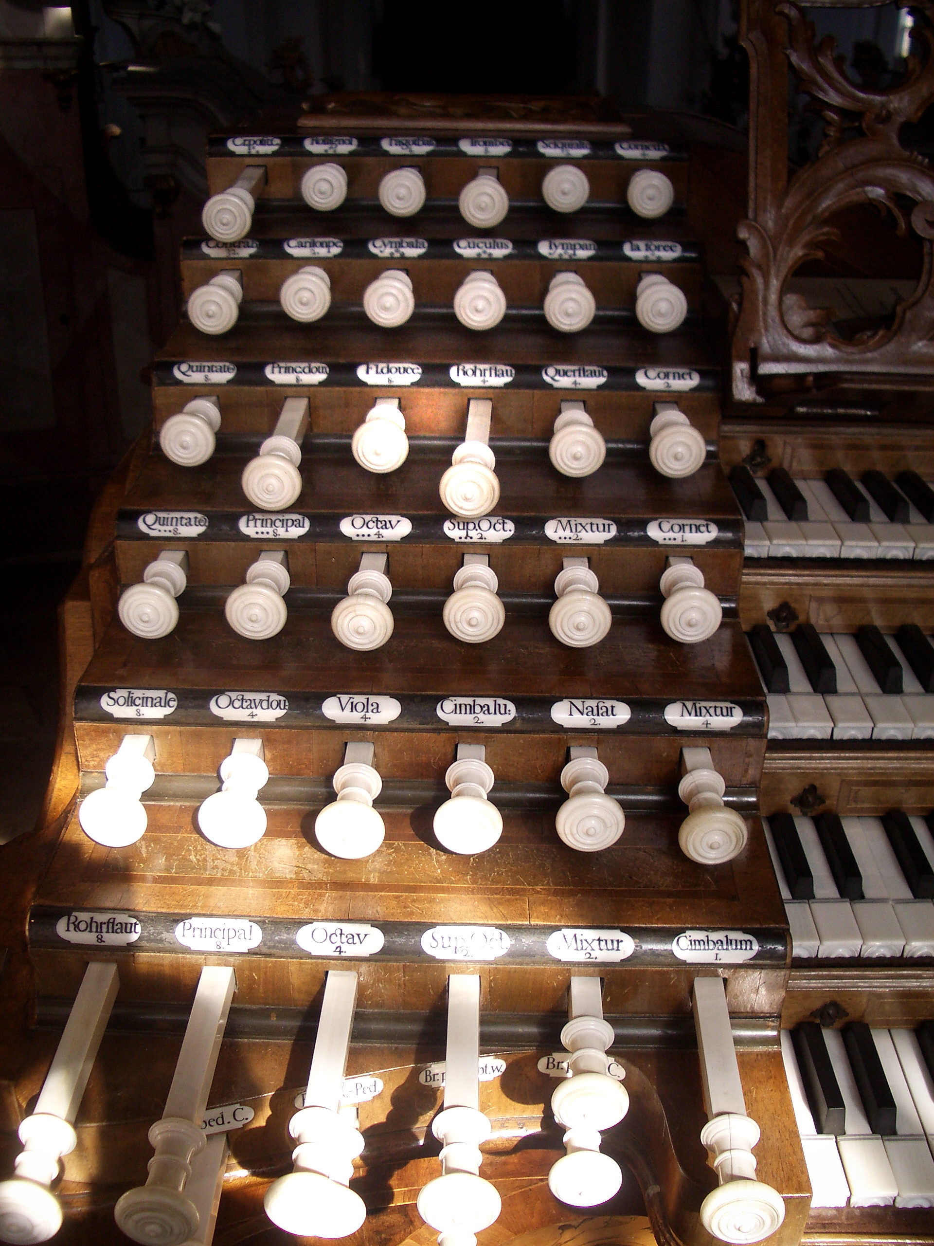 Weingarten, Germany: Basilika St. Martin, Organ by Joseph Gabler